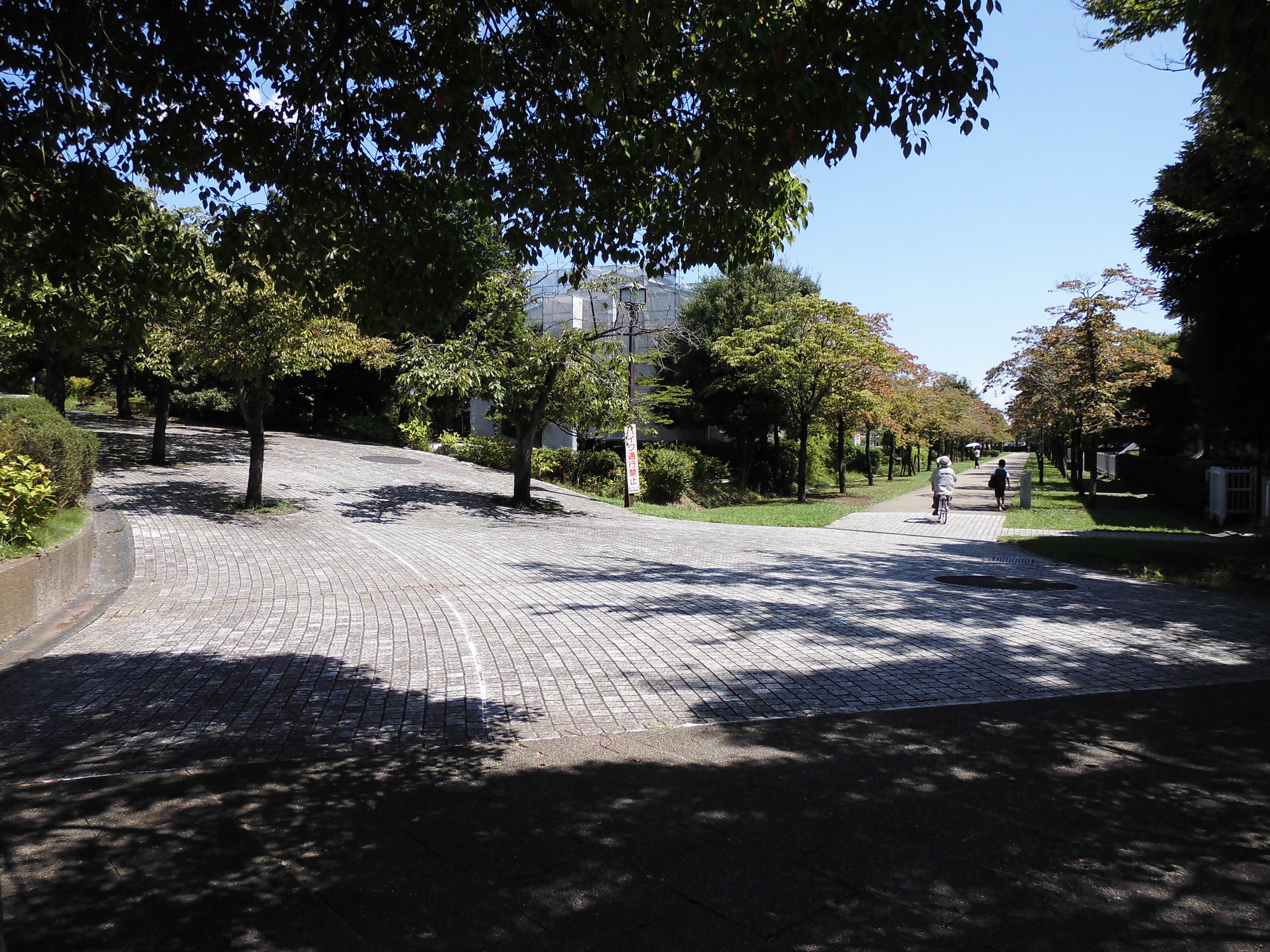 多摩ニュータウンでネットワーク化されている遊歩道の分岐地点130828